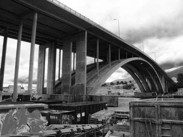 Puddefjordsbroen i Bergen, sett fra Gyldenpris.